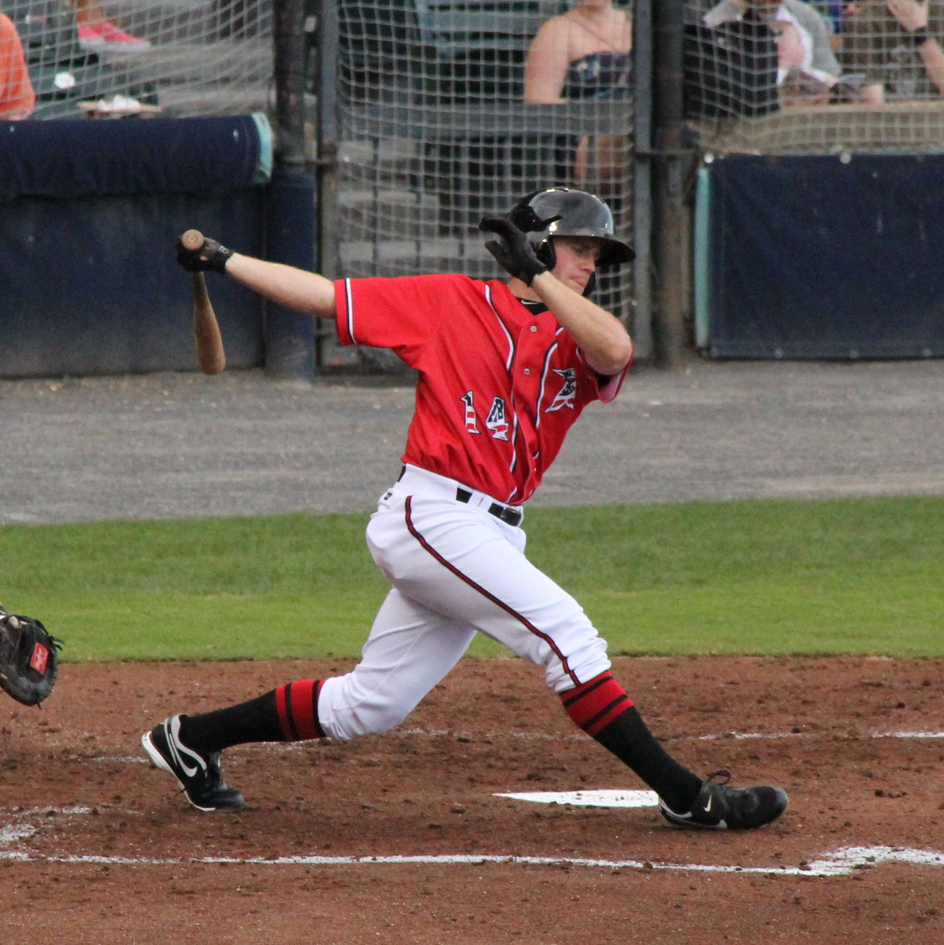 7/5/13 Skyler Stromsmoe at bat.